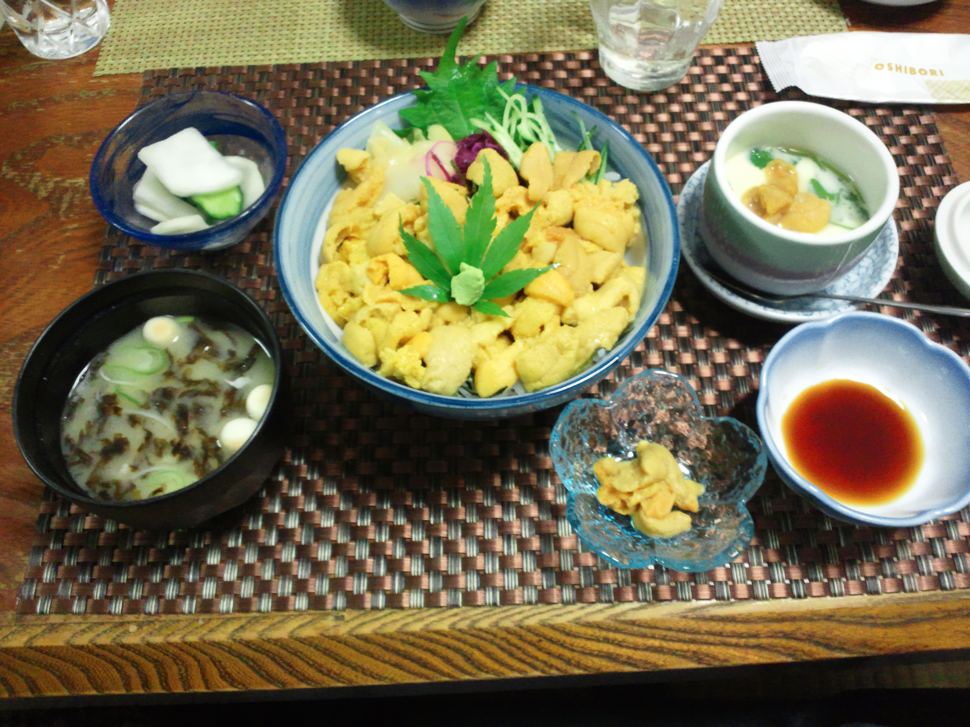 北海道美国 食事処 純の店 トリプルうにセット （うに丼・うに茶碗蒸し・追いうに）